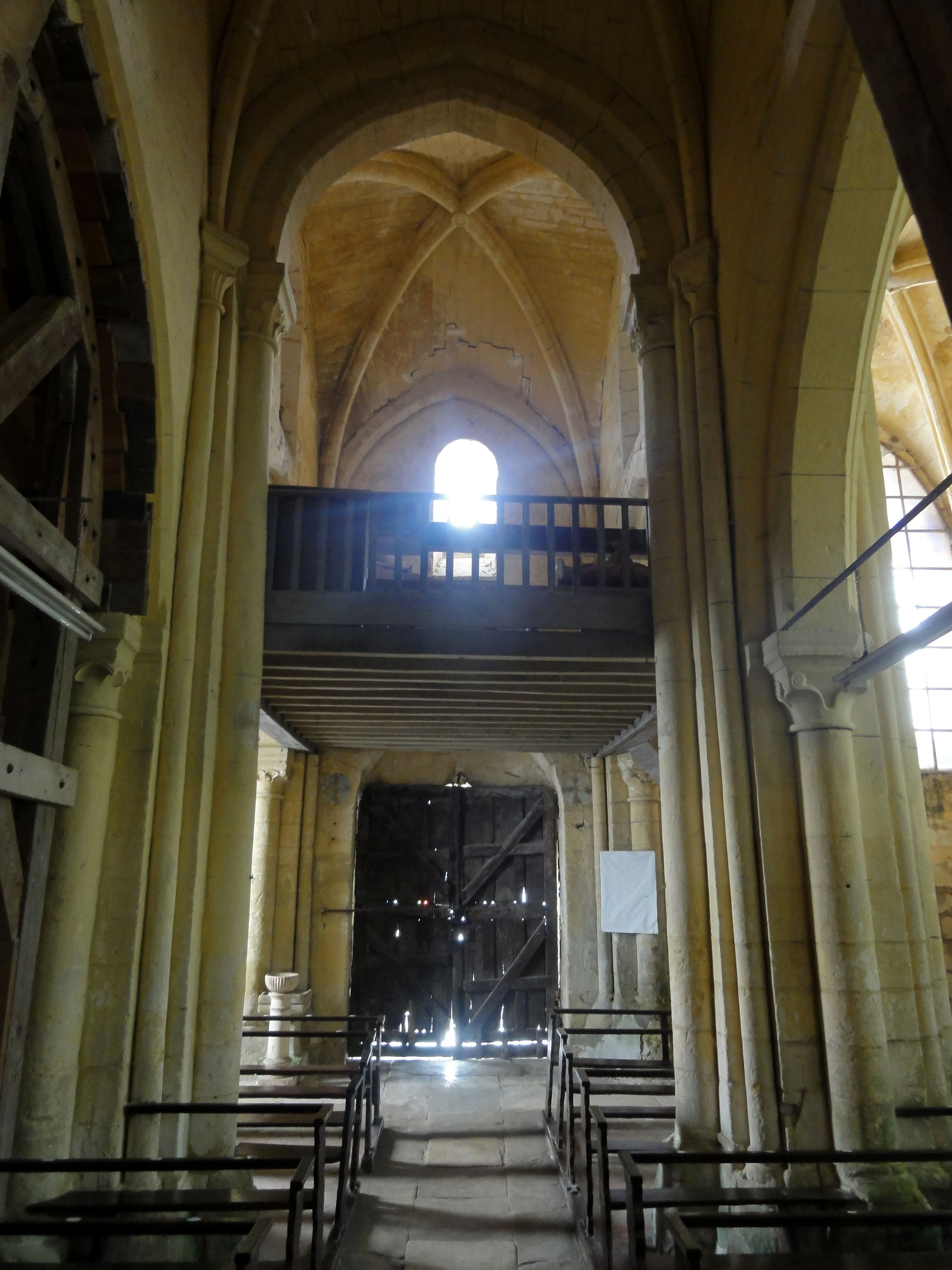 Nef, deuxième travée, vue vers l'ouest.